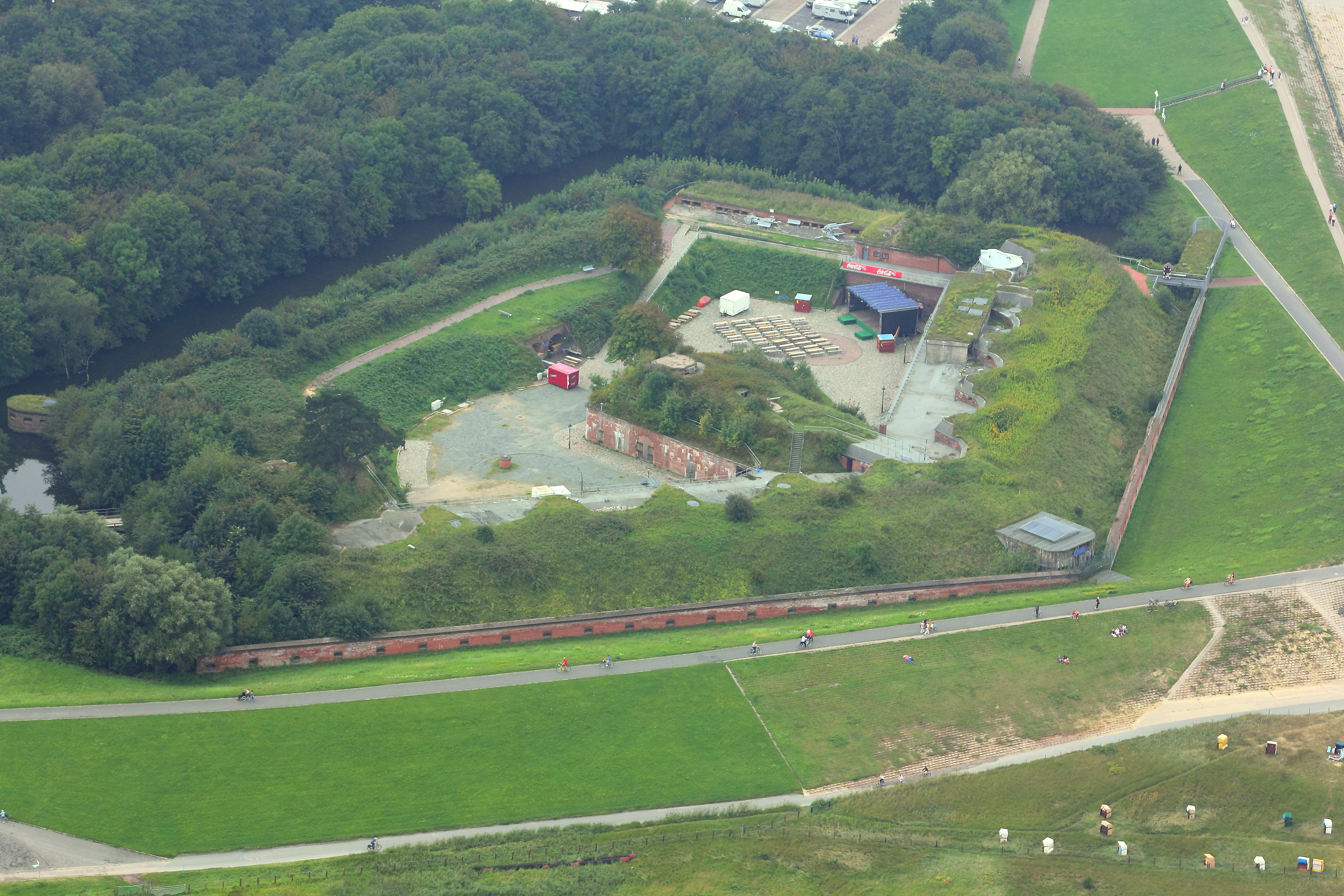 Luftaufnahme Fort Kugelbake, Cuxhaven